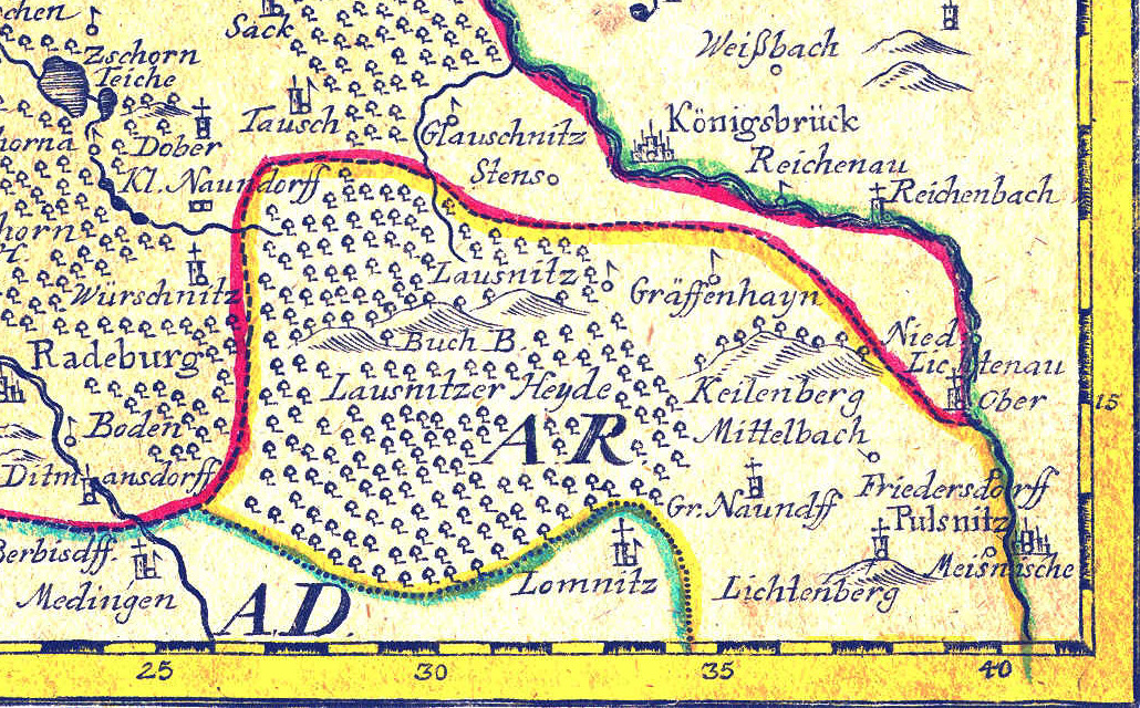 Ämter Grossen-Hayn und Zabeltitz